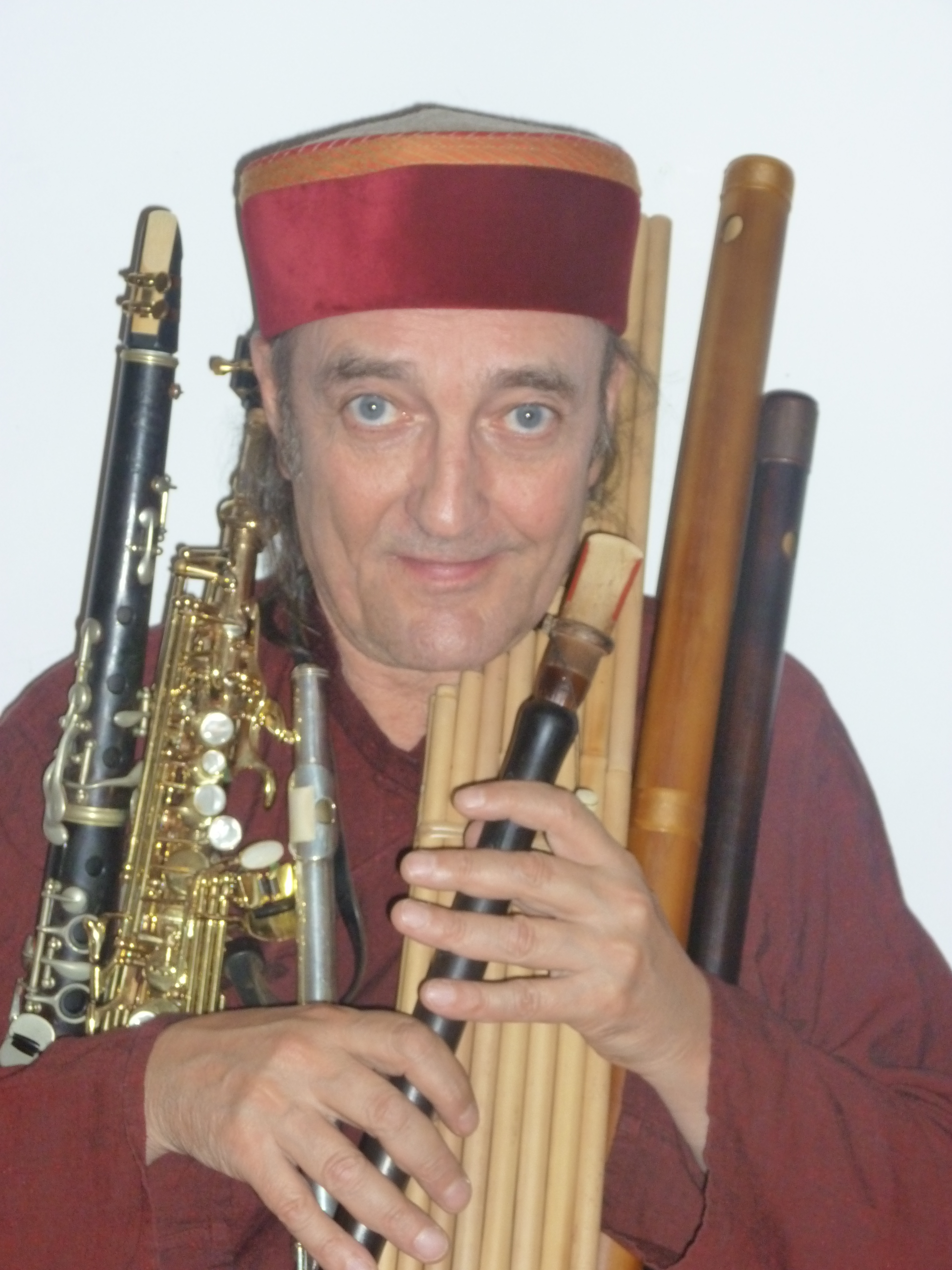 Didier Malherbe et ses Instruments